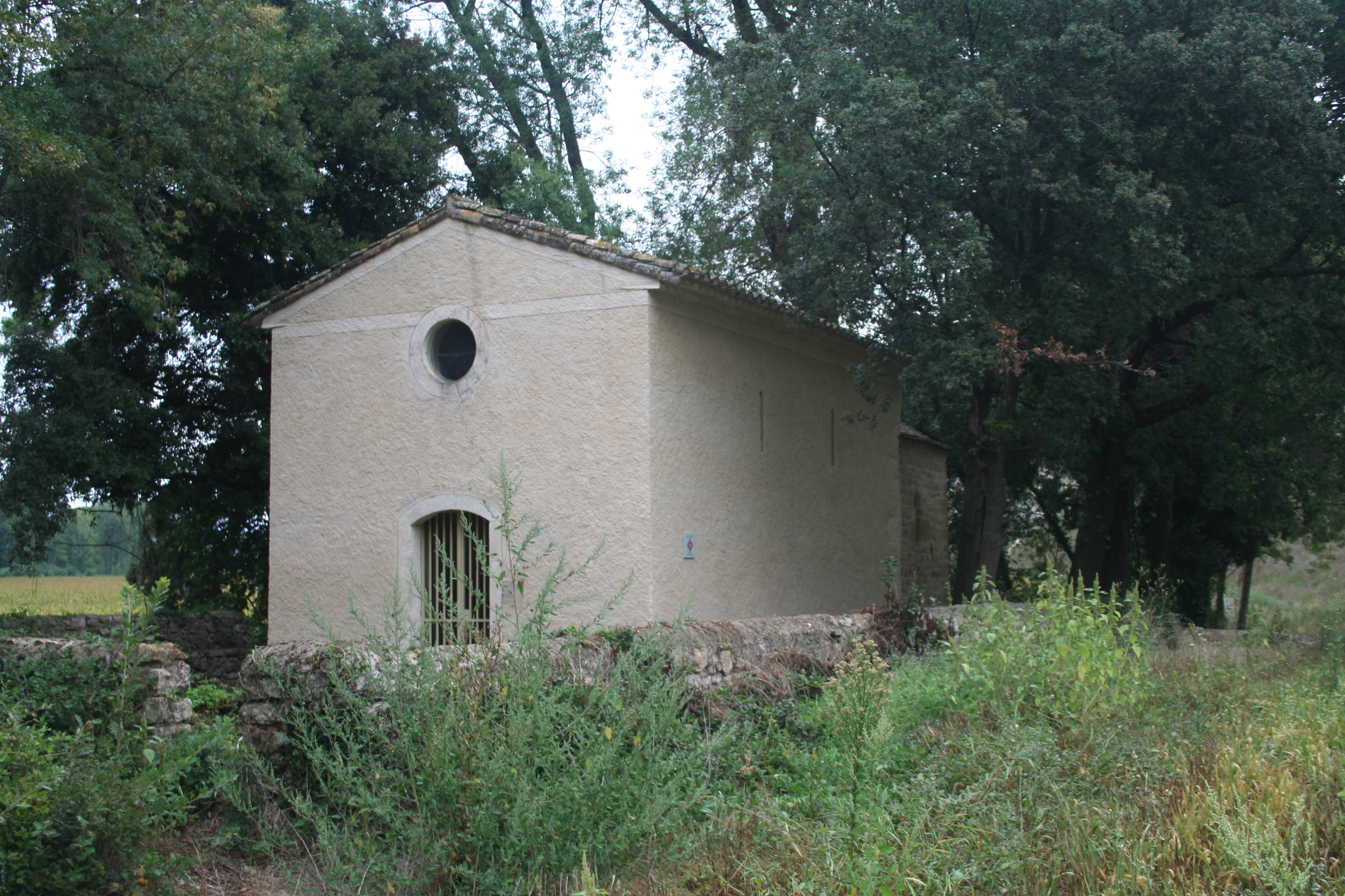 Bédarieux, Hérault - chapelle préromane Saint-Raphaël de la Bastide